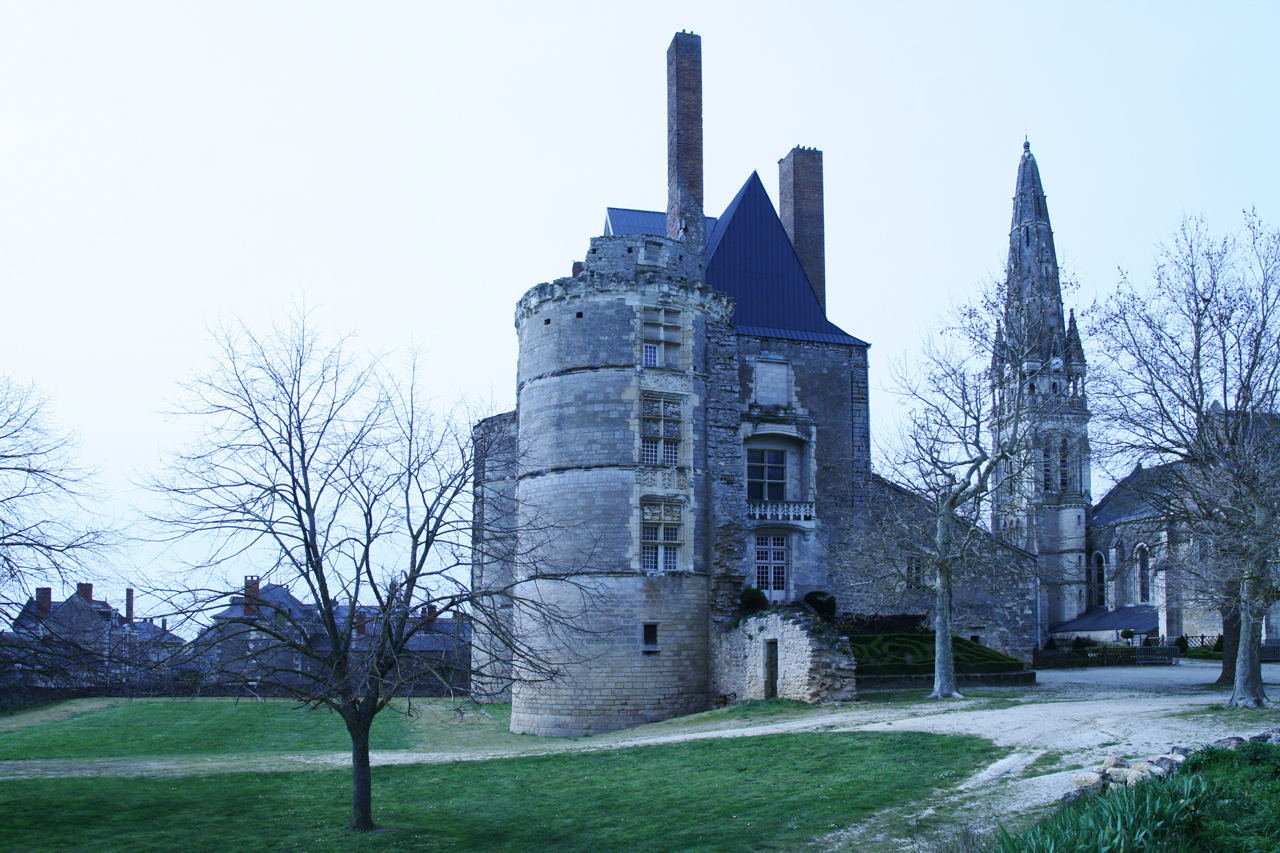 Chateau de Martigné-Briand